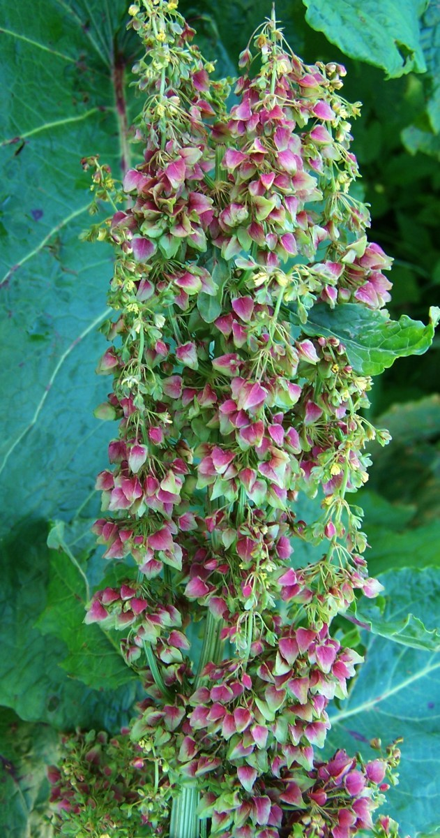 Rumex alpinus (pl. szczaw alpejski), habitat: West Tatra Mountains, Polana Upłaz